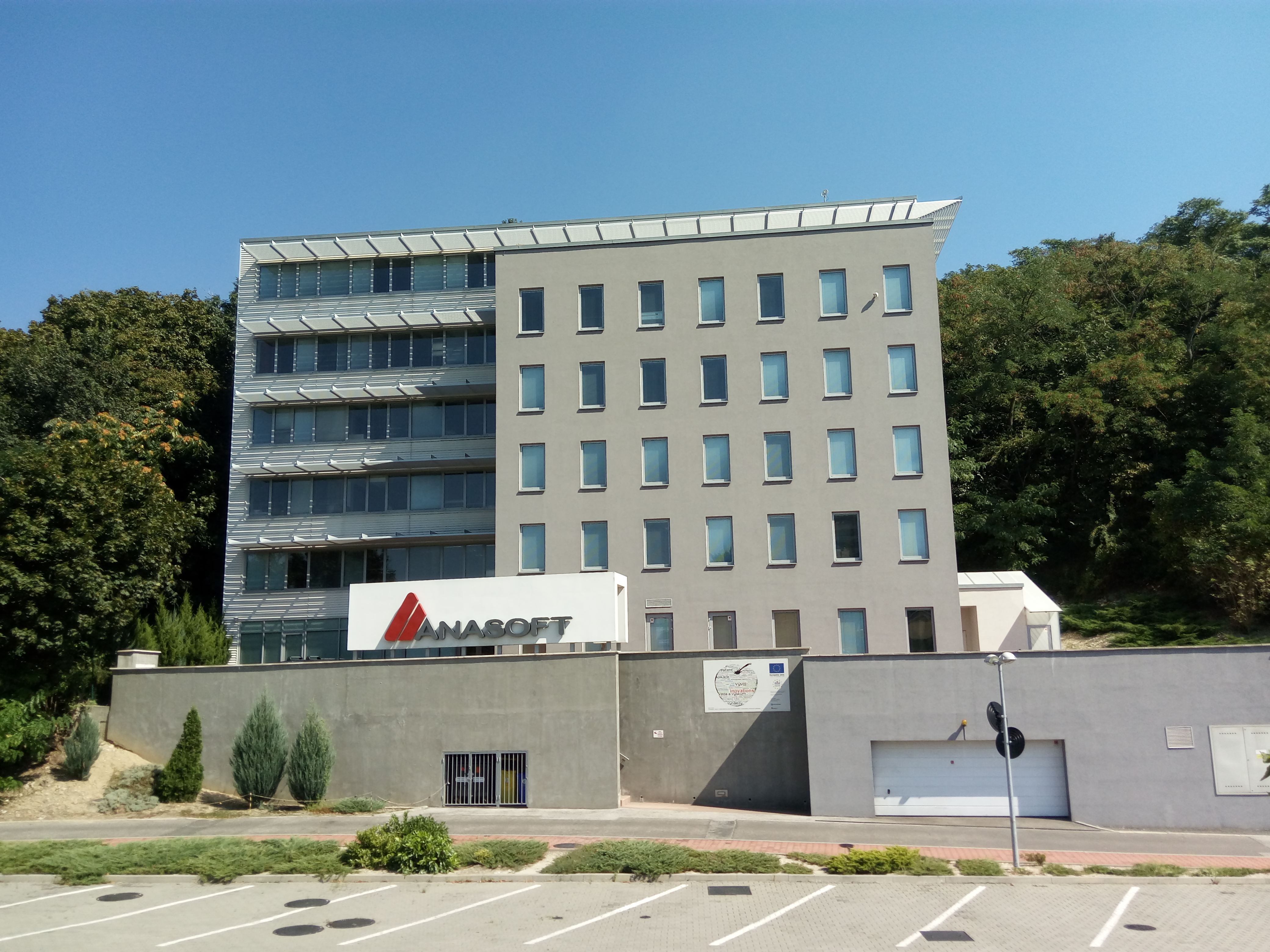 Mlynská dolina 41, Staré Mesto, Bratislava